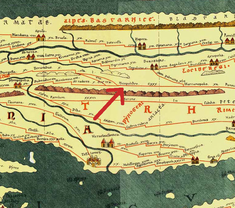 Ausschnitt aus der Tabula Peutingeriana mit Nicopolistro = Nicopolis ad Istrum (roter Pfeil)